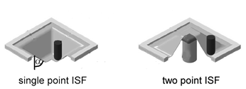 Xafla metalikoen deformazioa.